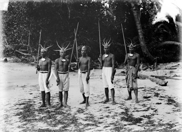 Negatief. Oud krijgskostuum van Engganezen, Enggano, Benkoelen